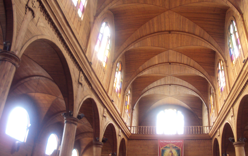 Boveda de la Iglesia de San Francisco, Chile.